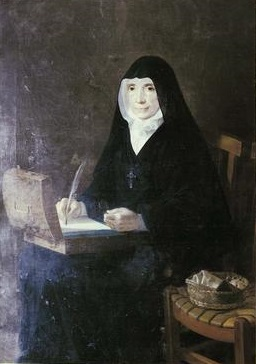 Portrait de Jeanne-Marie Desclaux, cofondatrice et première supérieure des religieuses de Notre-Dame de la Compassion.